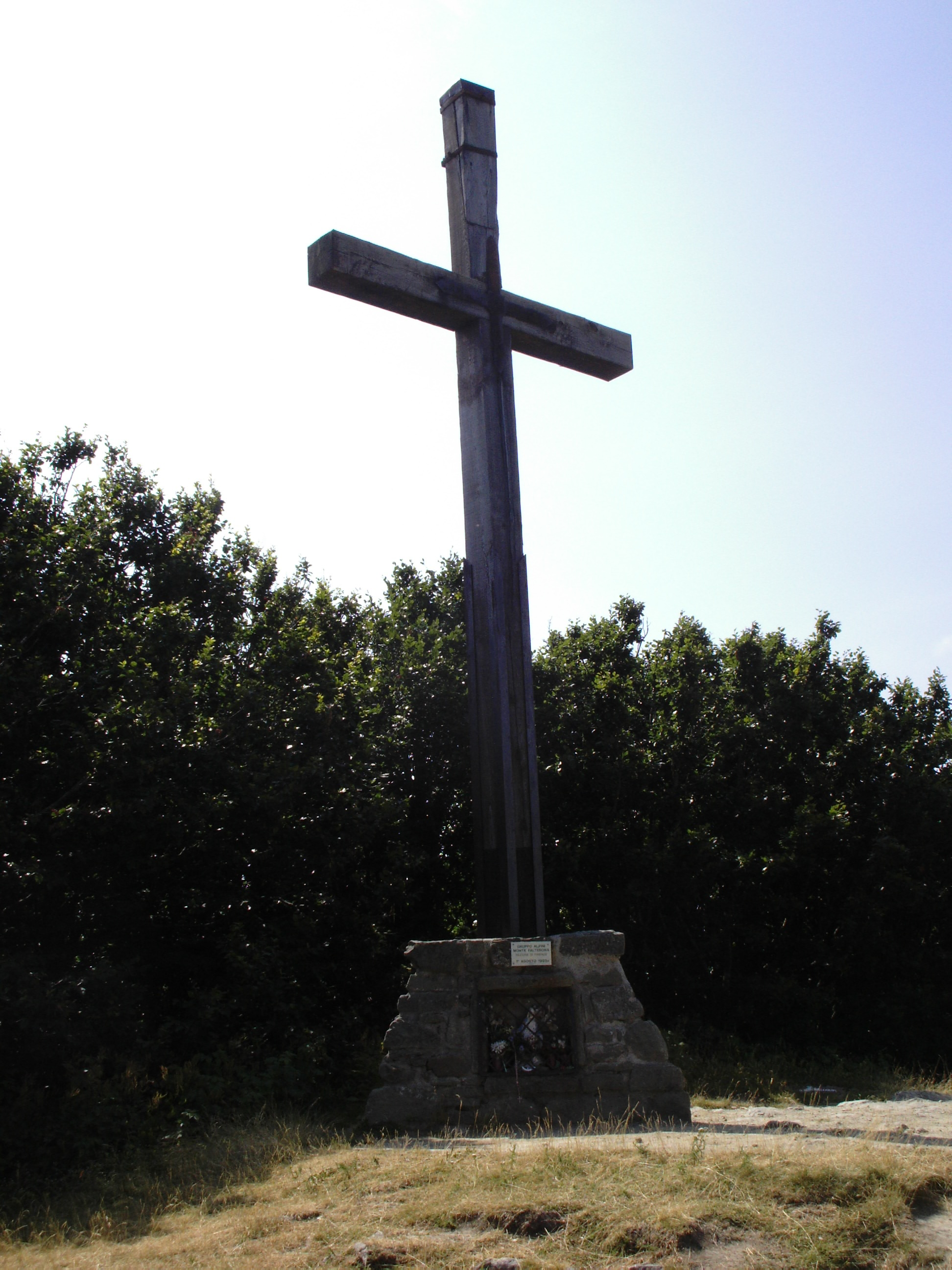 Monte Falterona, Croce sulla vetta